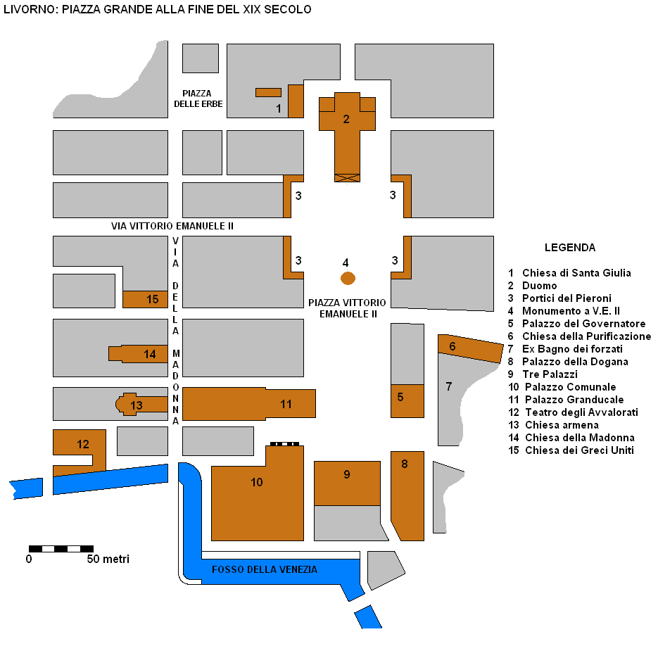 Livorno: planimetria di Piazza Grande, allora chiamata Piazza Vittorio Emanuele II, alla fine del XIX secolo.